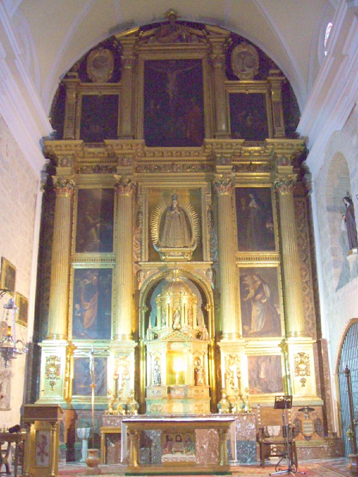 Convento de la Purísima Concepción de Franciscanas Descalzas (Bernardas), en Jaén